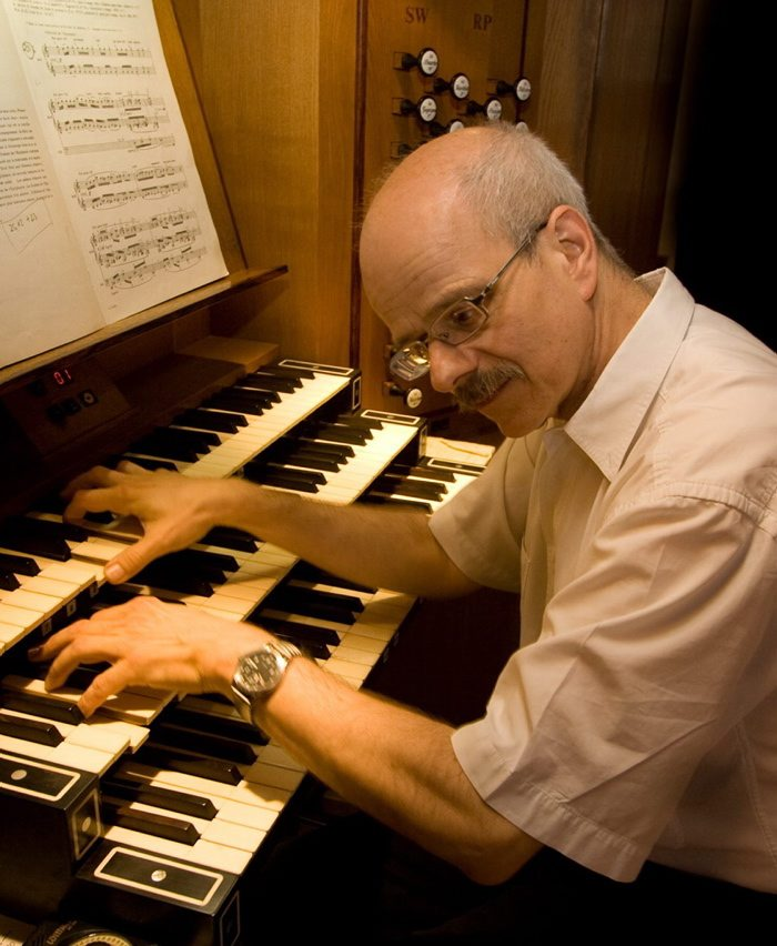 Organist Martin Lücker an der Orgel in der Katharinenkirche, Dezember 2008.